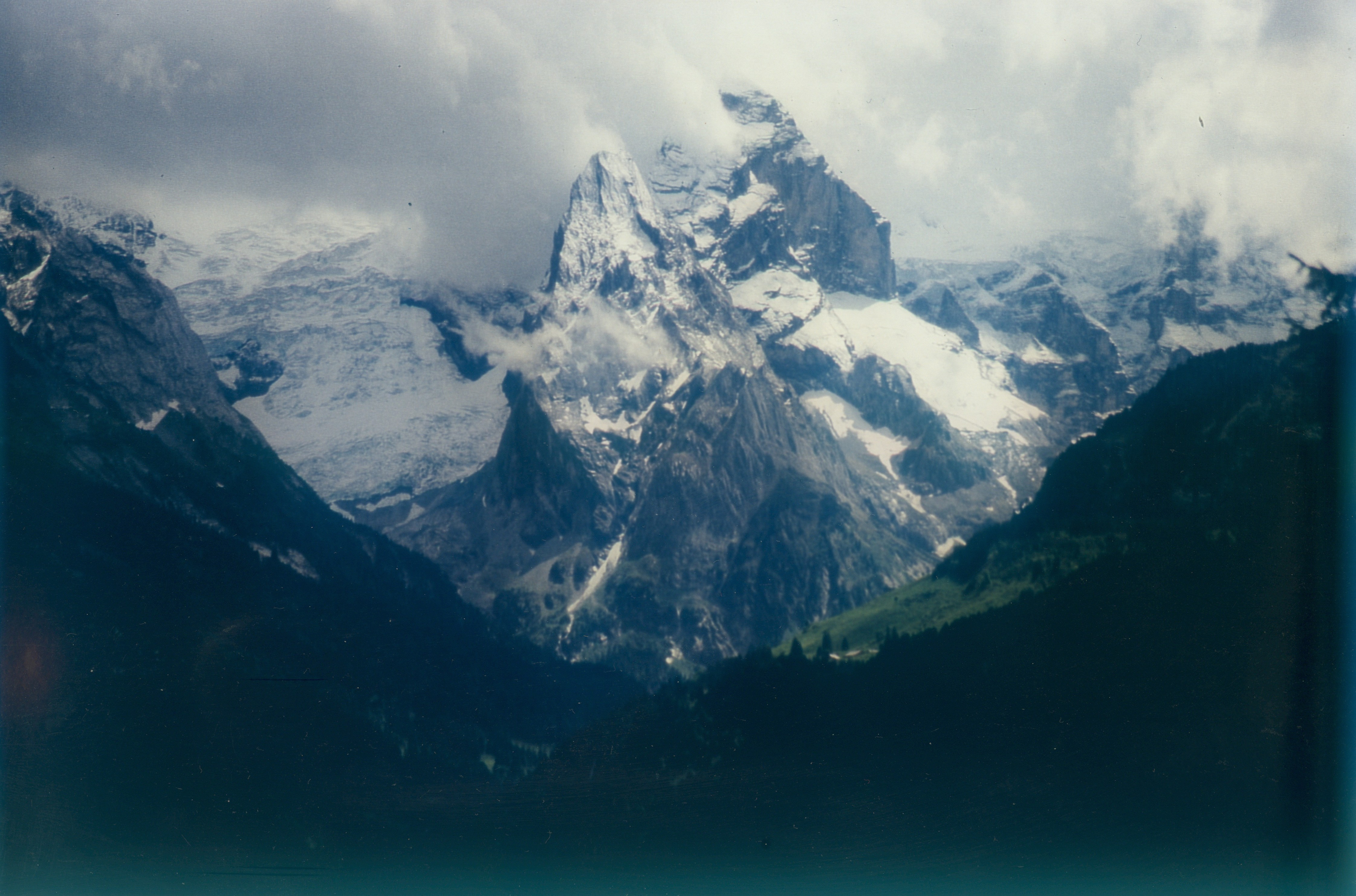 Wetterhornmassiv von der Straße Goldern—Reuti (Gemeinde Hasliberg); Coverbild des auf Martin Wagenschein basierenden Lehrstücks "Wettersteine" (1997)